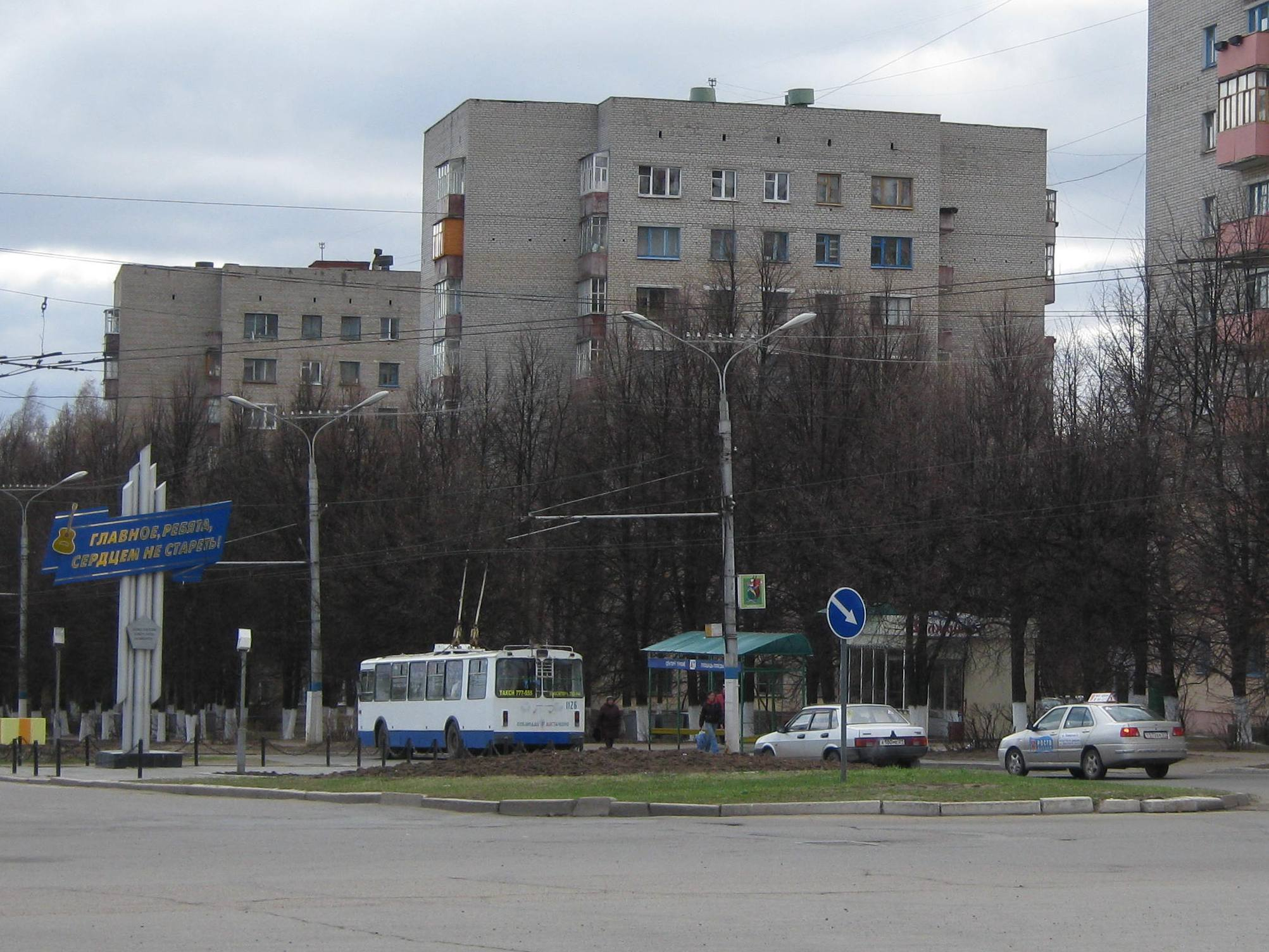 Вид на улицу Жени Крутовой в Новочебоксарске.